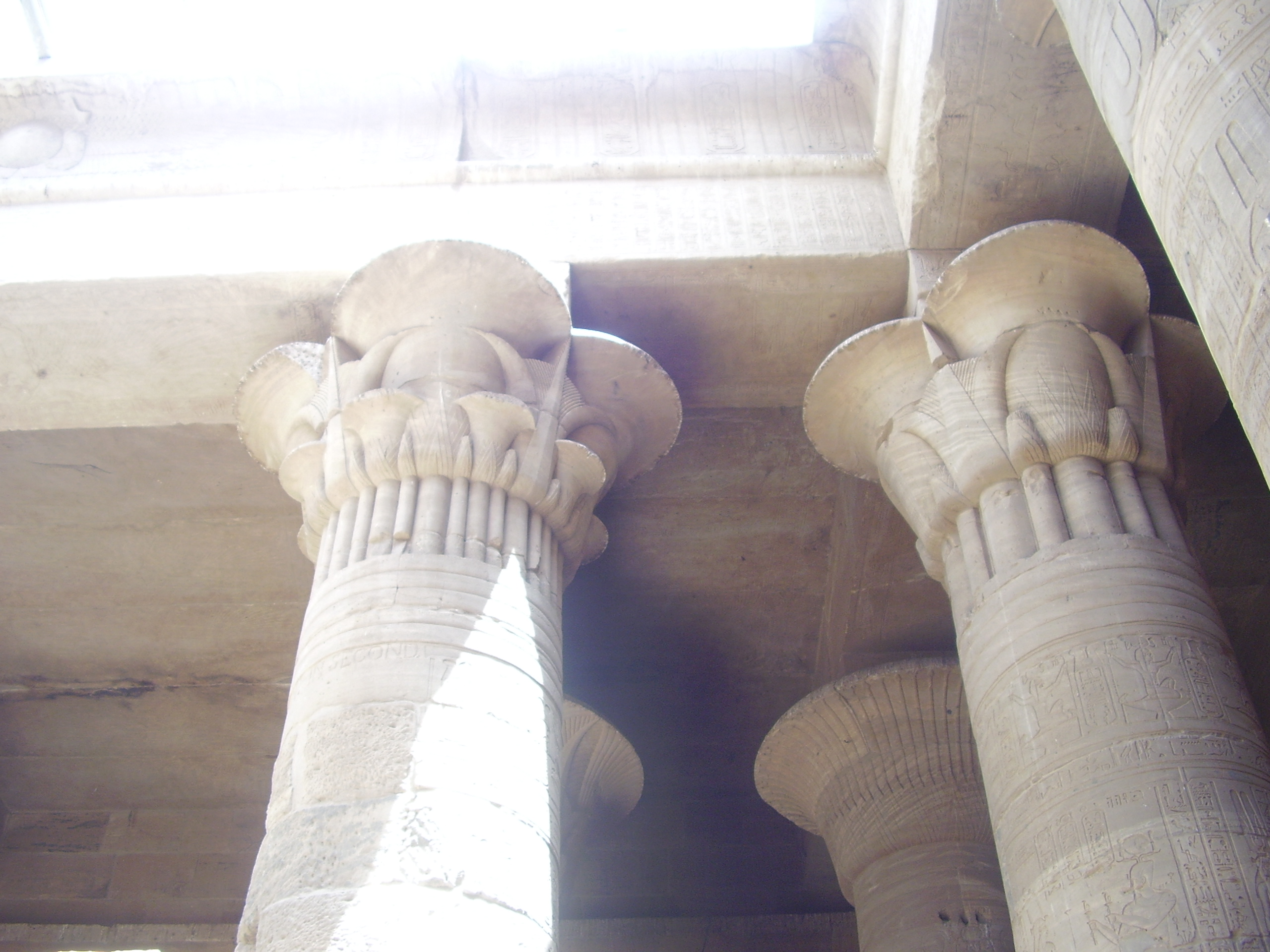 nice view very good &amazing work from many years ago